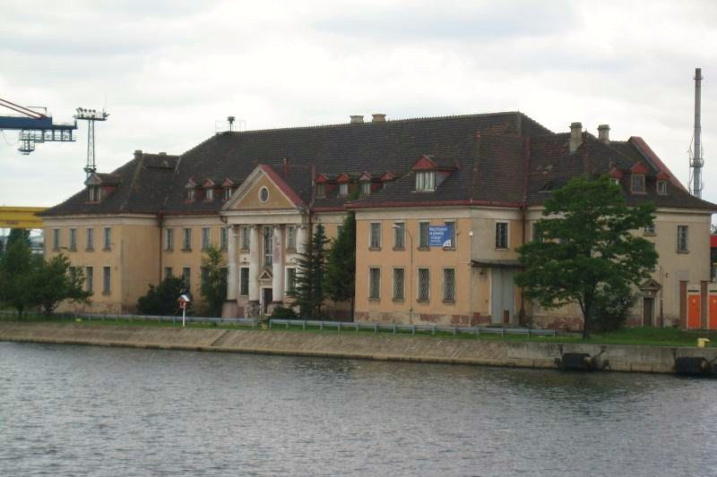 Gdańsk Letnica. Dawna Poczta Morska (zbudowana w 1927 r.), ul. Chodackiego 26.